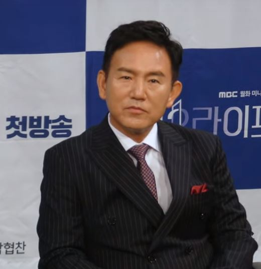 5일 오후 서울시 마포구 상암동 MBC에서 MBC 새 월화드라마 '웰컴2라이프' 제작발표회가 열렸다.